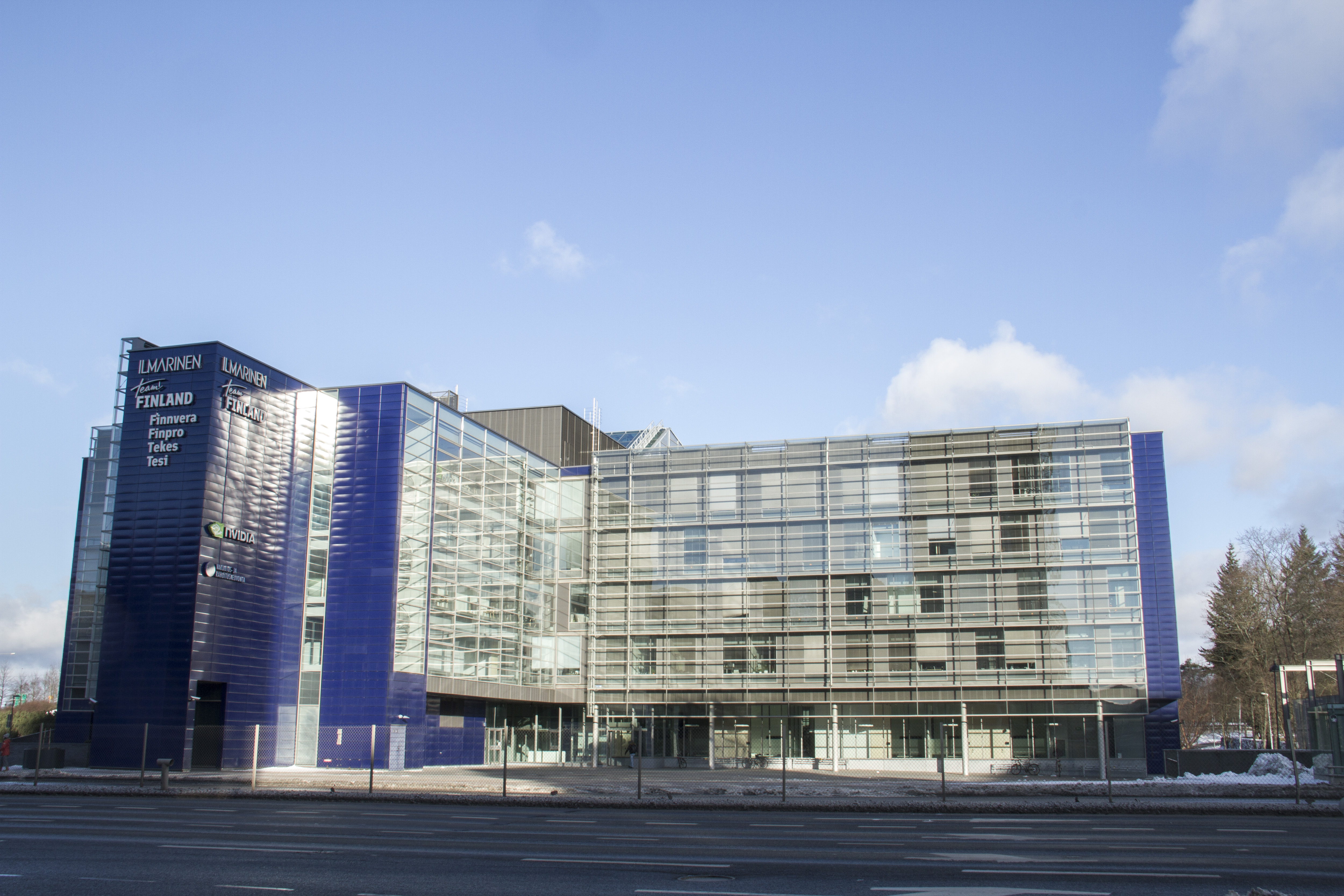 Helsingin Ruoholahdessa sijaitseva Team Finland -talo, jossa sijaitsevat Tekes, Finpro, Finnvera ja Tesi. Ilmarisen pääkonttori.